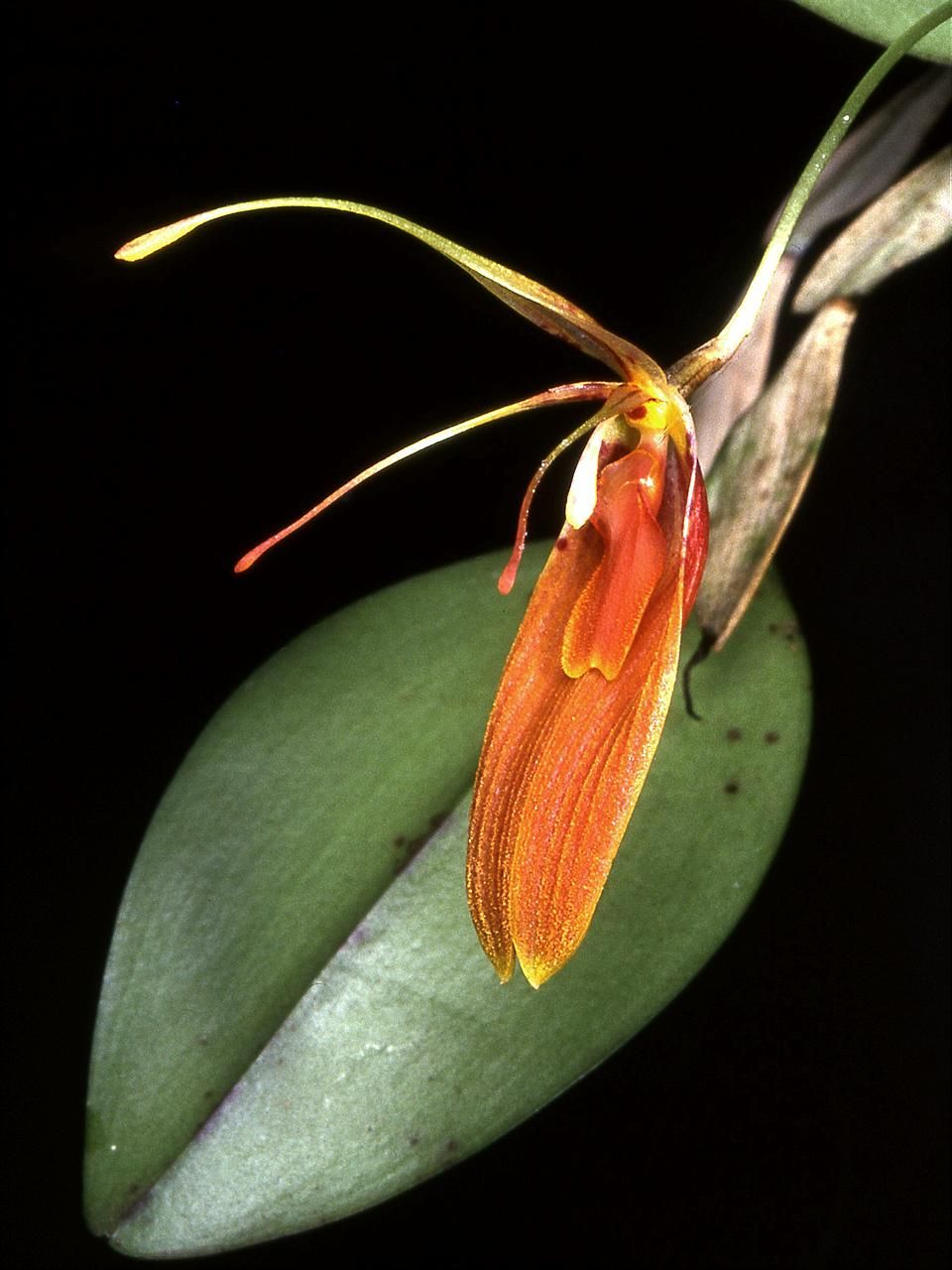 Restrepia cuprea - flower